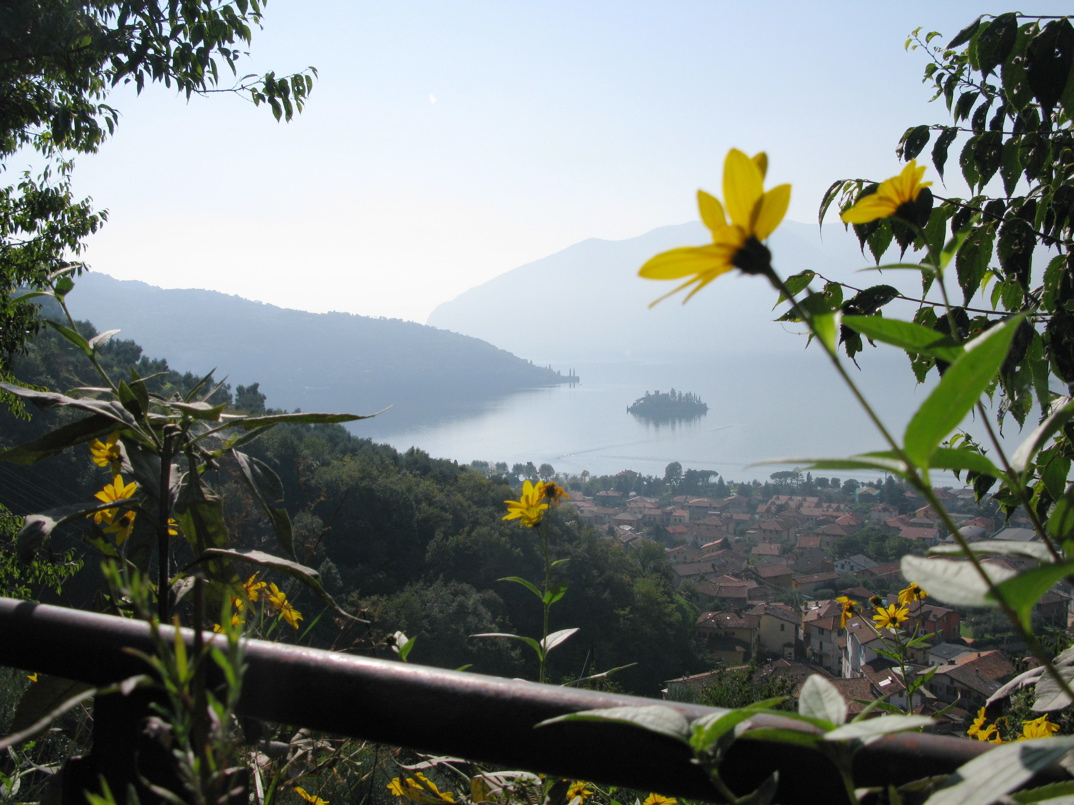 Lago d'Iseo, Marone, Montisola and Isola di Lorete